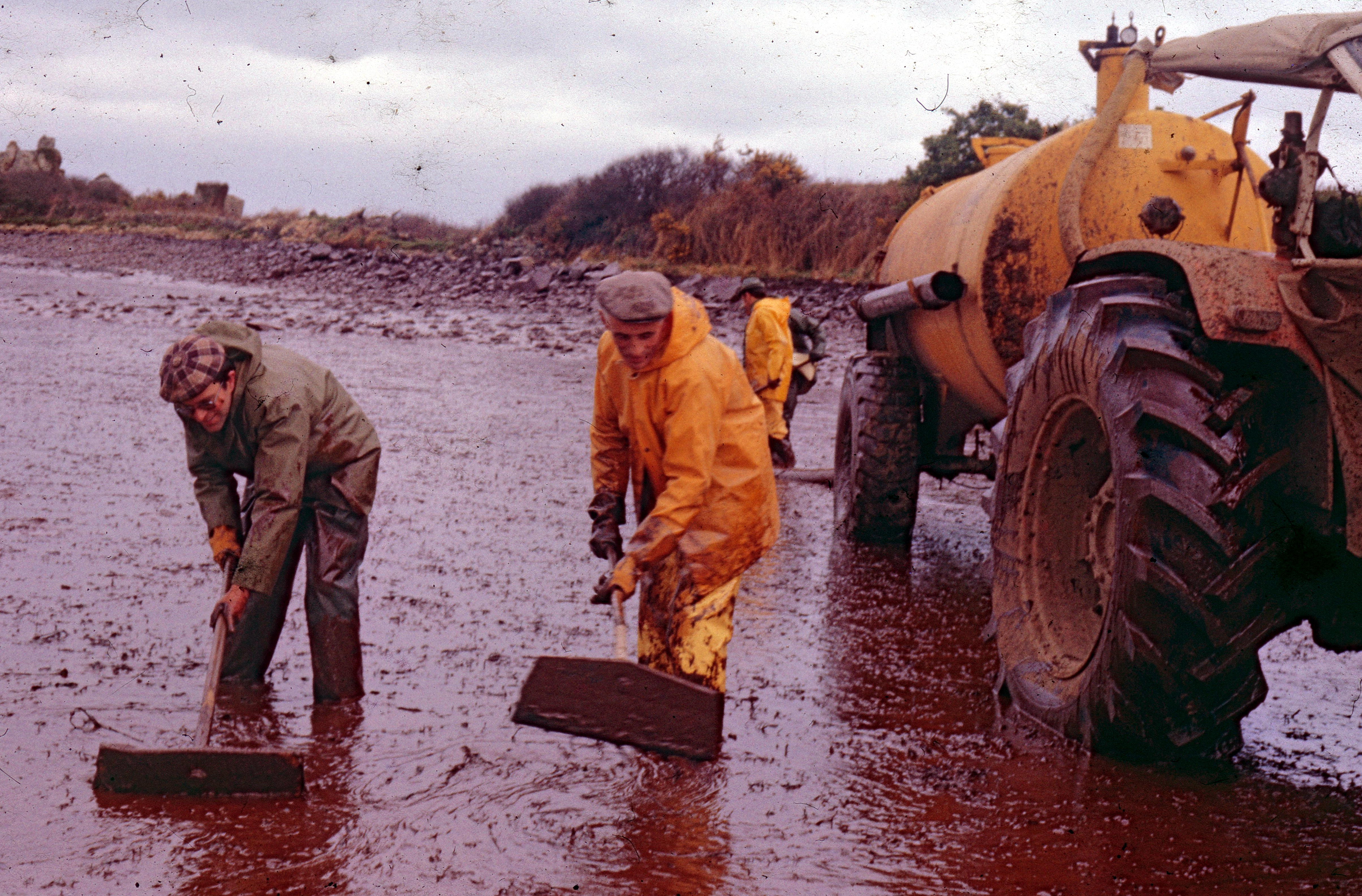 Nettoyage d'une plaene ge des Côtes-d'Armor à la suite du naufrage de l'Amoco Cadiz.